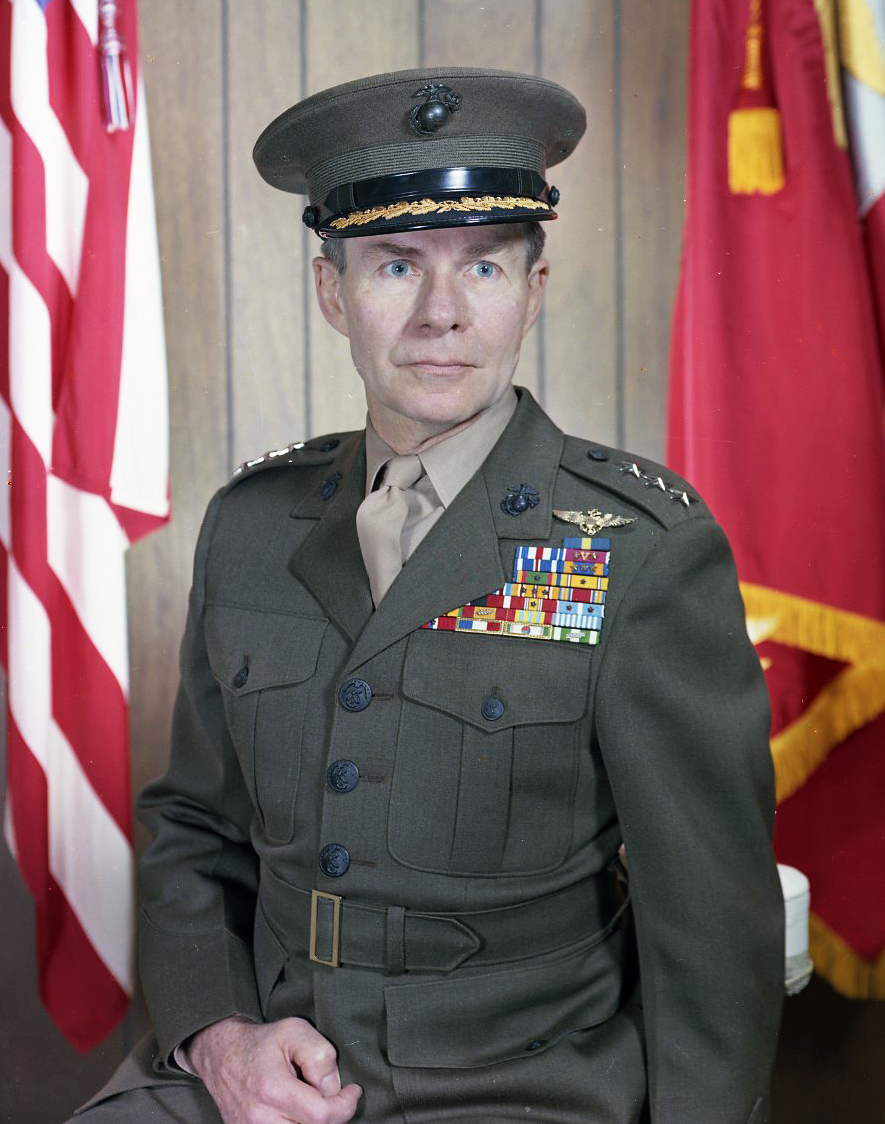 Lt. Gen Keith B. McCutcheon, USMC